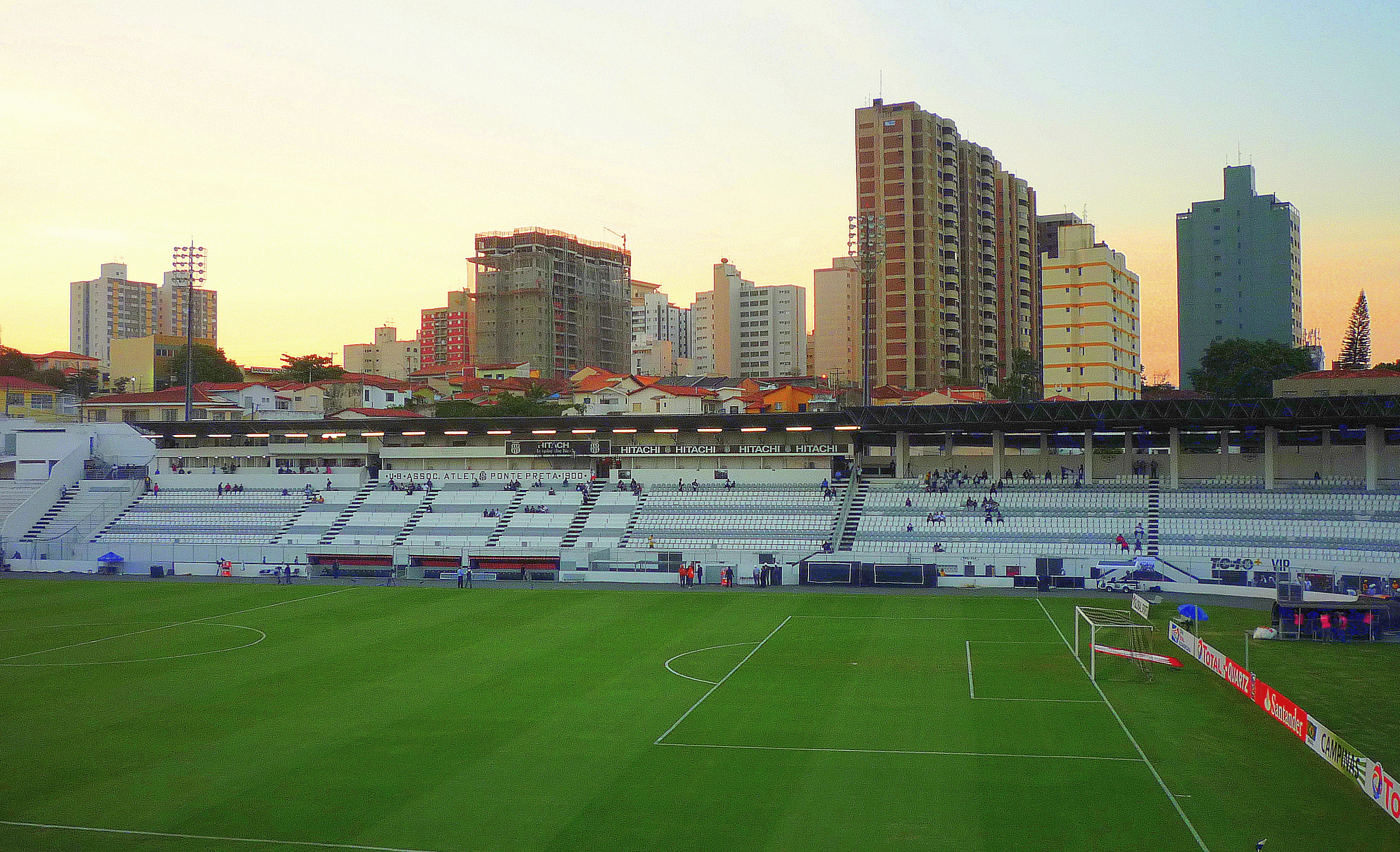 O entardecer no estádio da Ponte Preta, Campinas-SP.